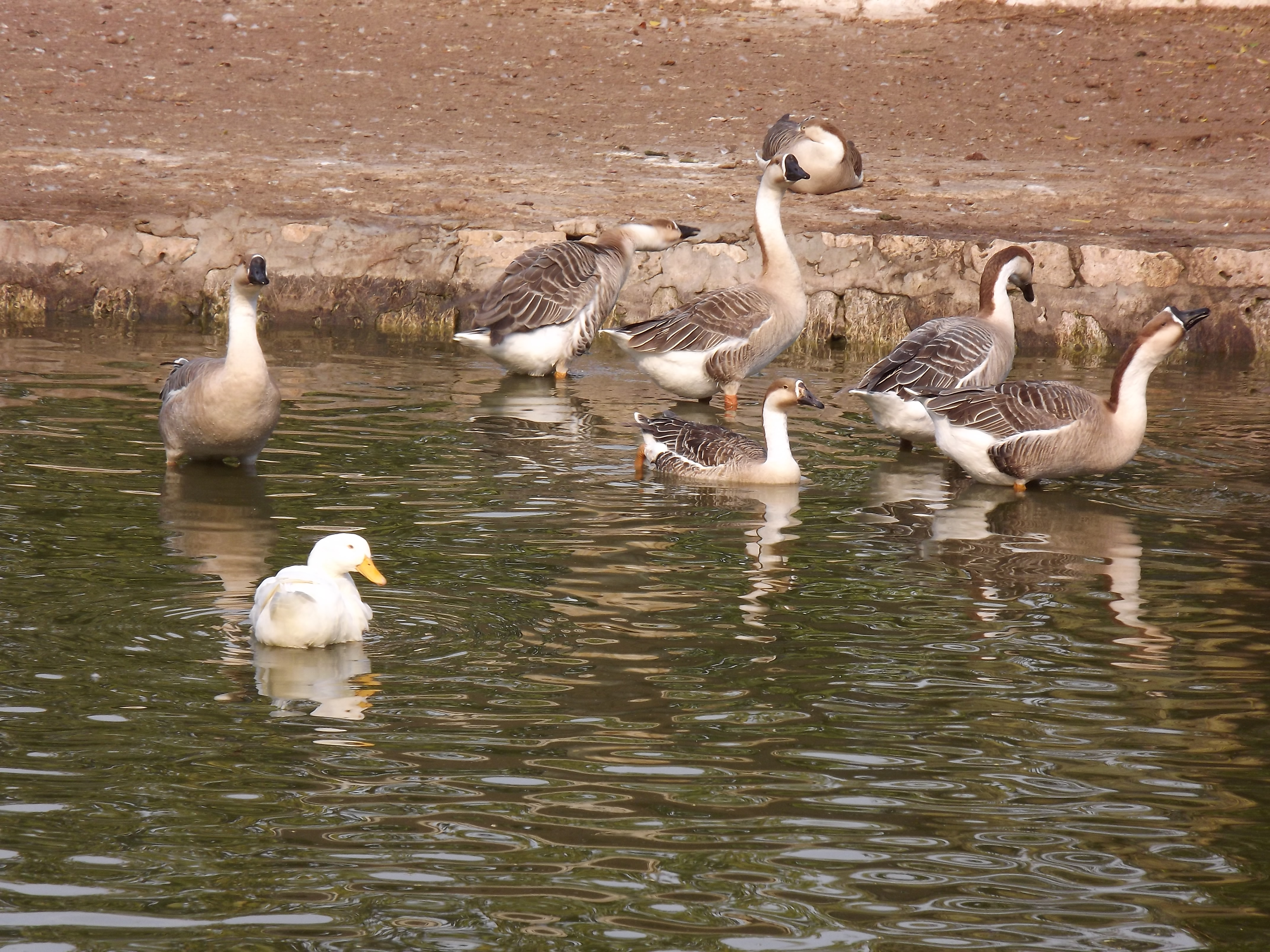 حديقة حيوان النزهة - الاسكندرية